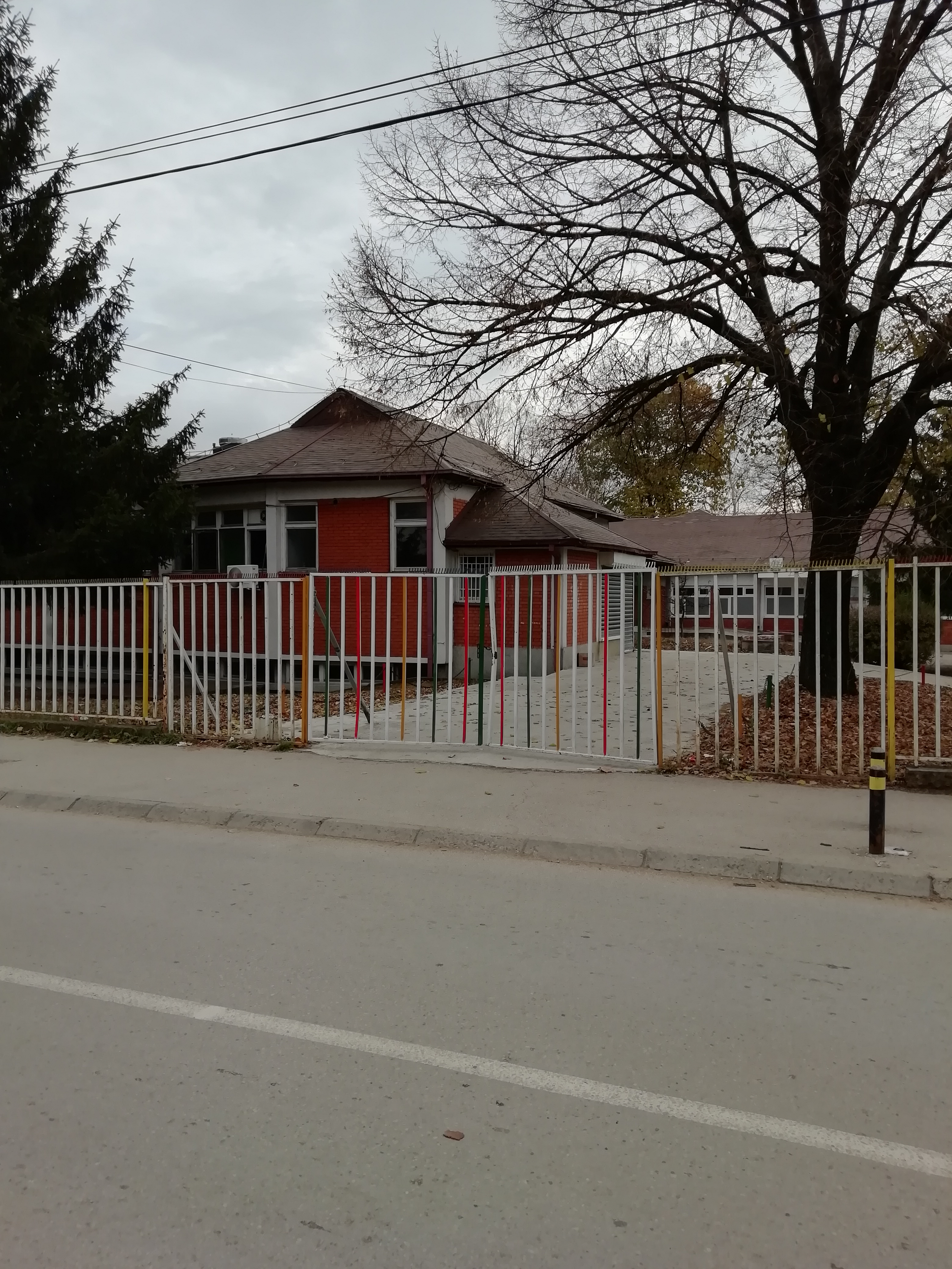 Вртић "Наше дете"